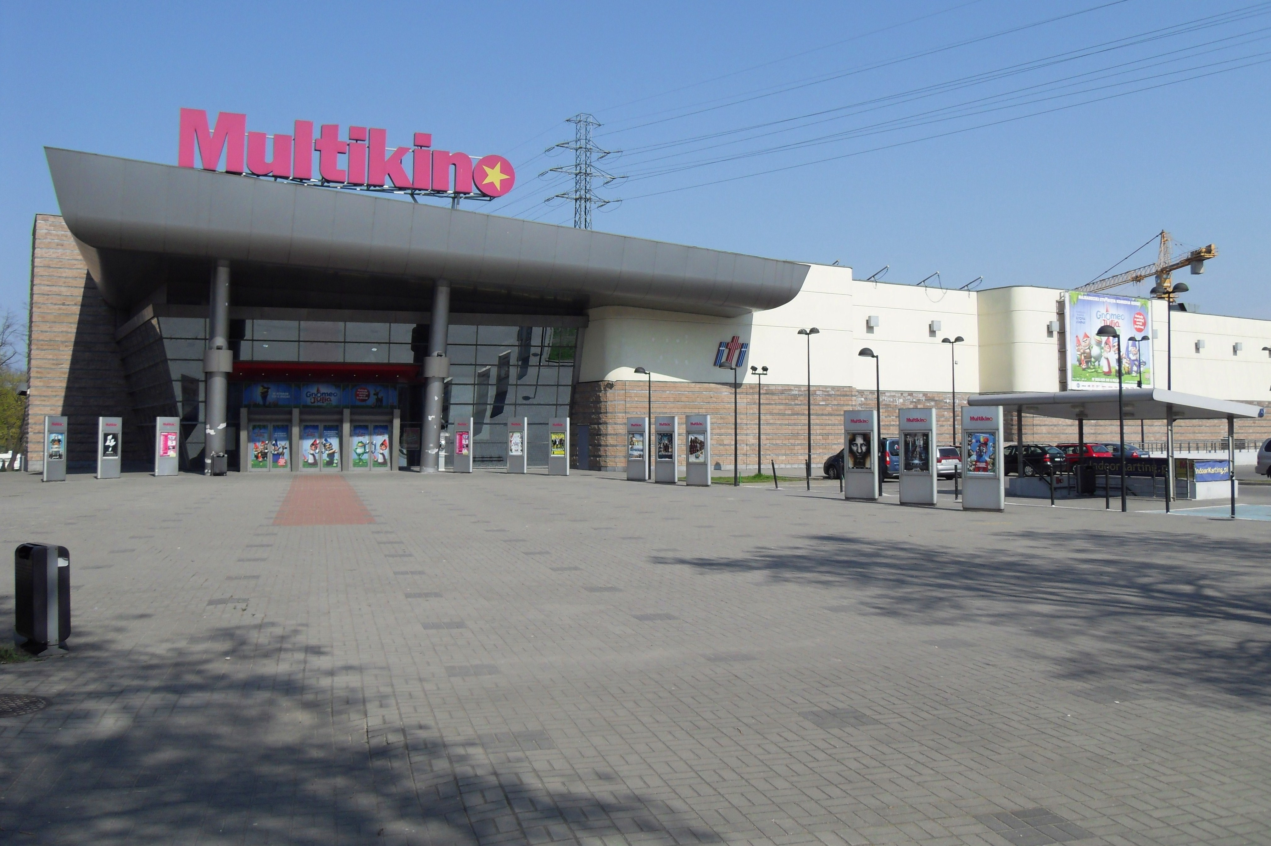 Gdańsk Aniołki. Multikino, al. Zwycięstwa 14.